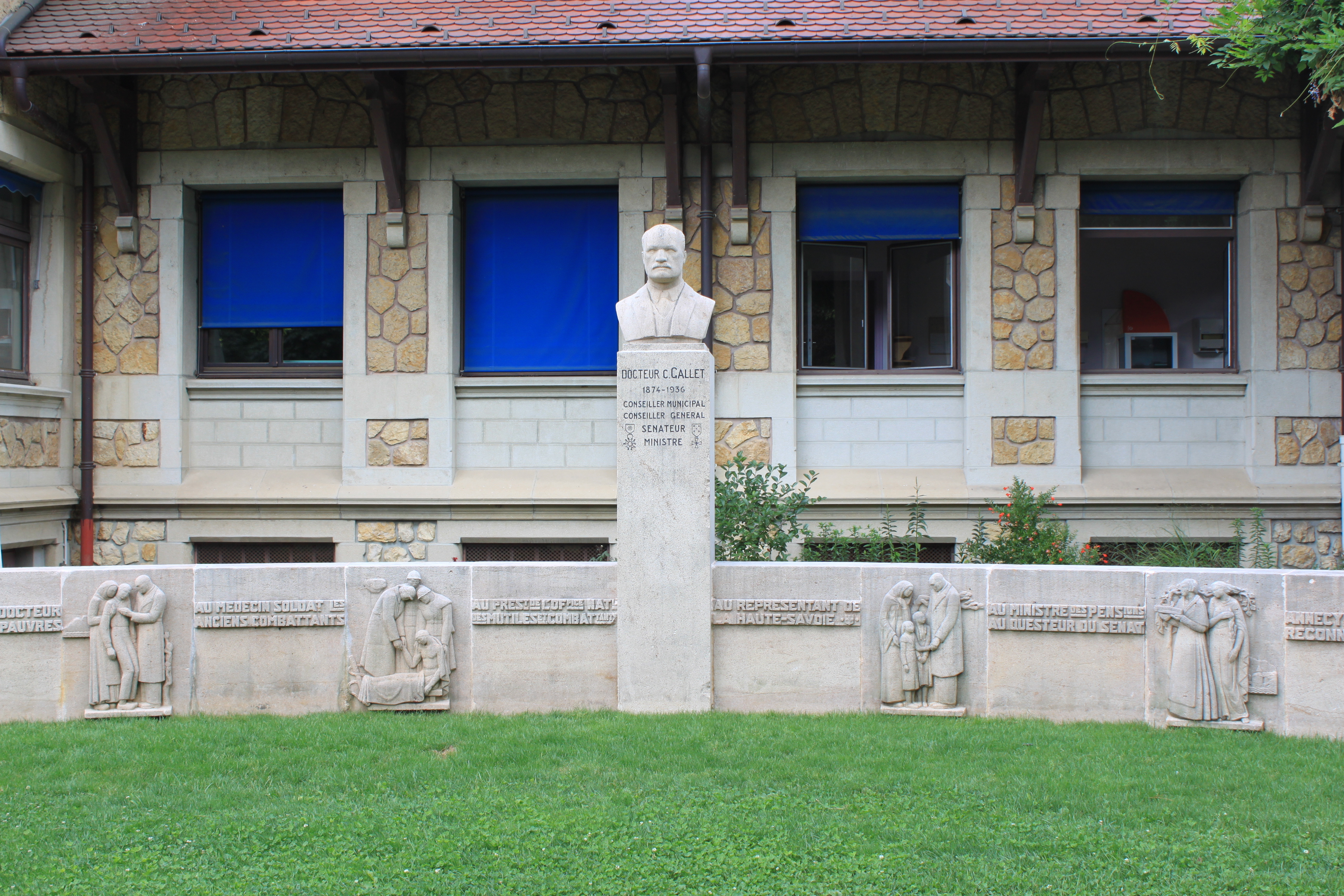 Annecy, Savoie, France